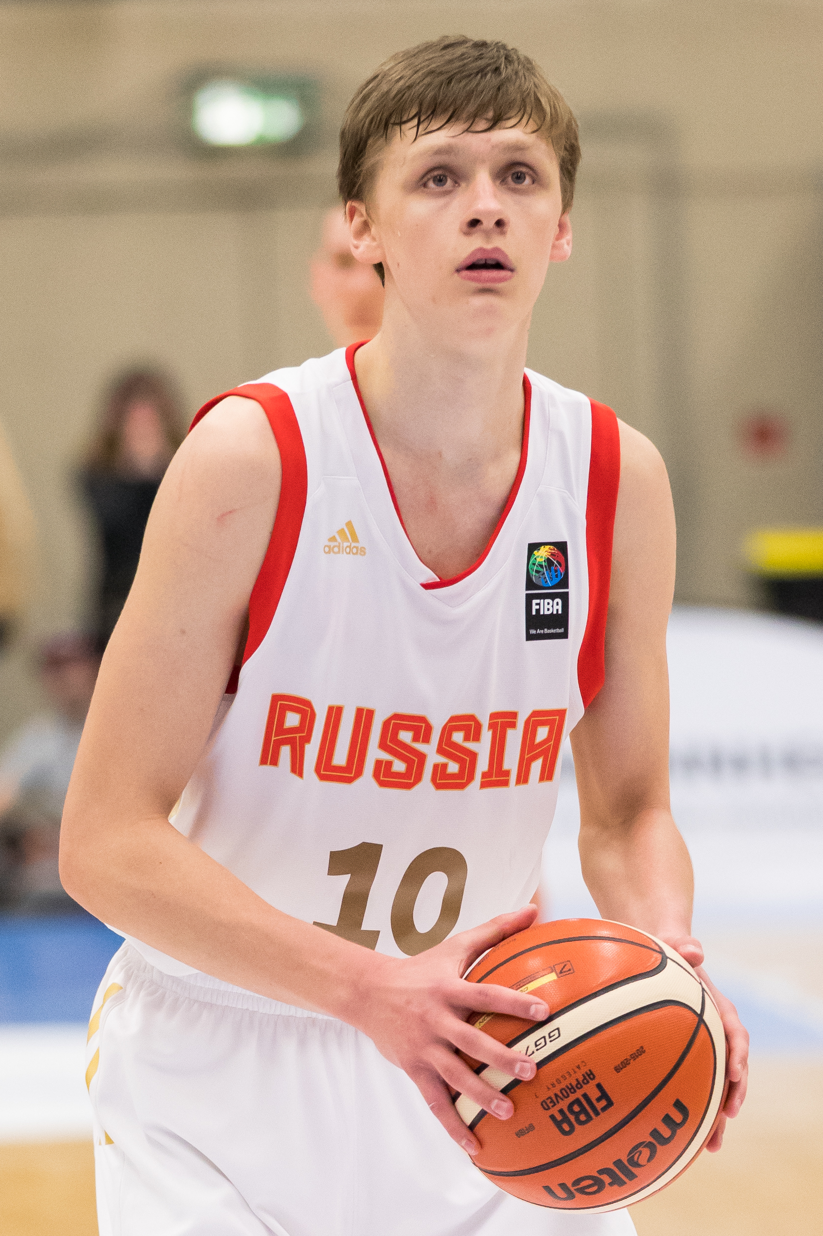 Germany vs Russia 80:75 during semi-final Basketball Albert Schweitzer Turnier at GBG Halle, Mannheim, Baden-Württemberg, Germany on 2018-04-06, Photo: Sven Mandel